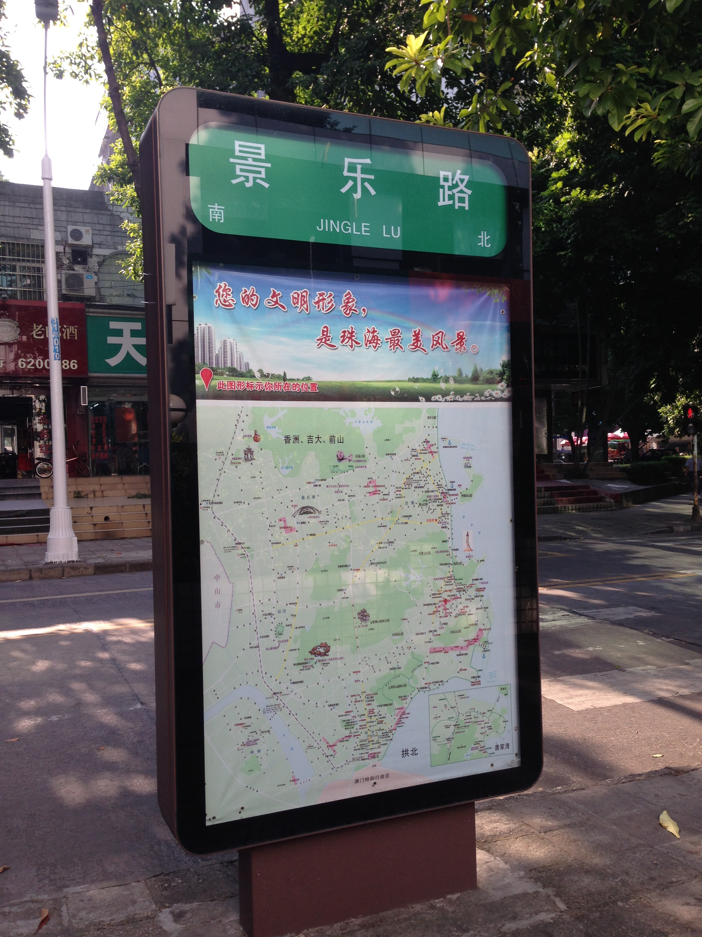 景乐路